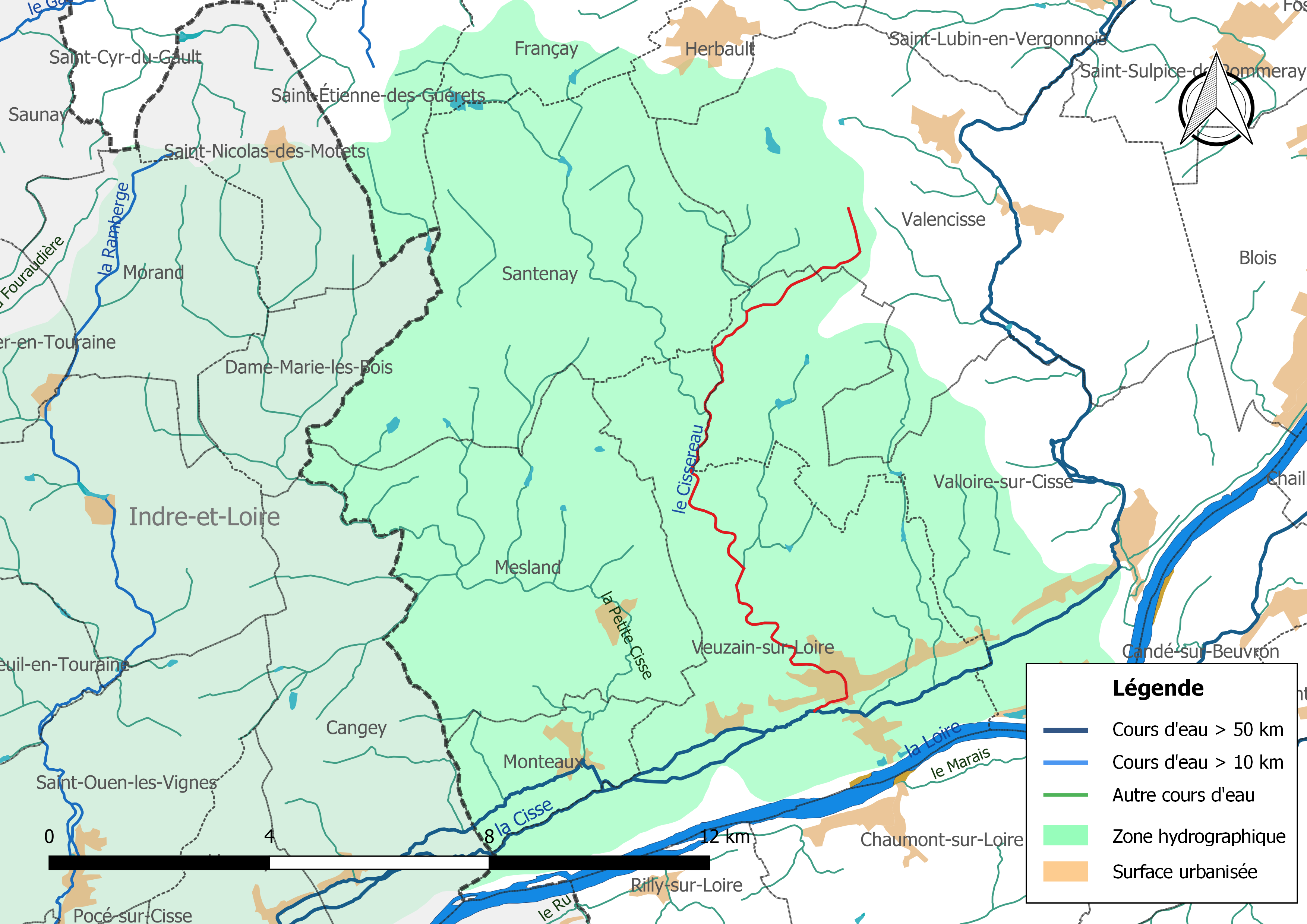 Carte du cours d'eau « le Cissereau » et de son bassin versant (zone hydrographique dans laquelle il s'insère).